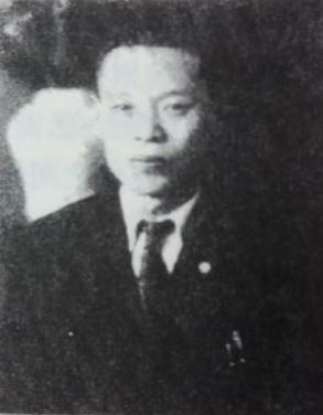 韩国早期戏剧人物李基世